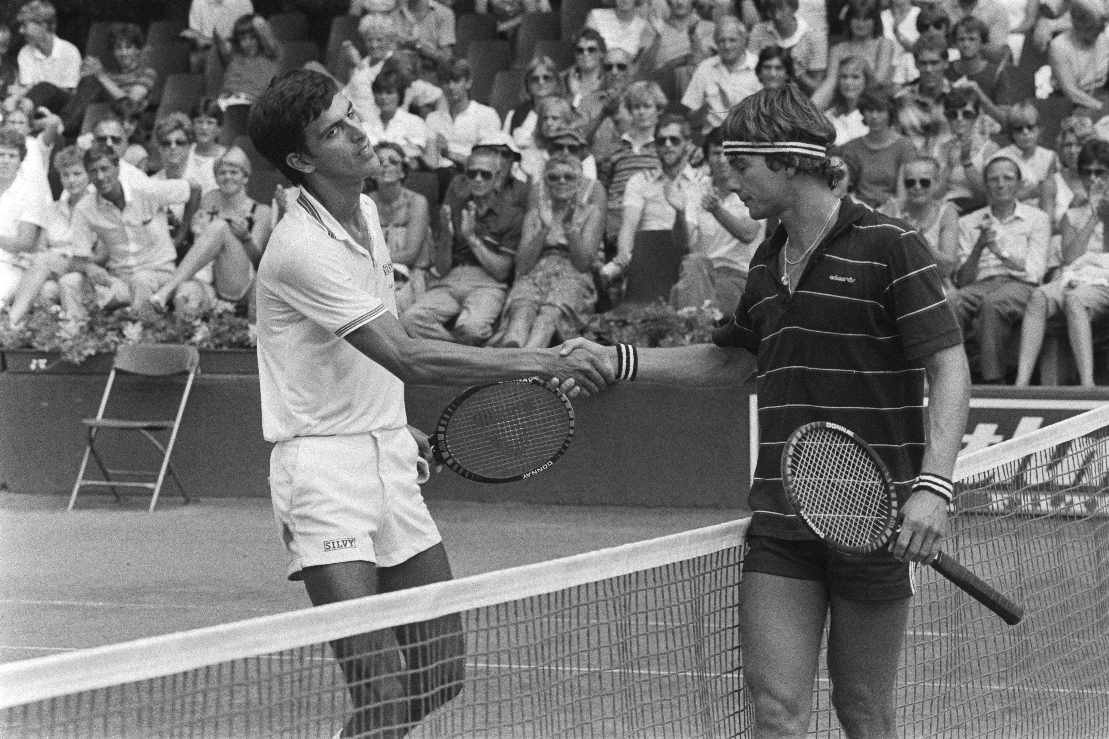 Collectie / Archief : Fotocollectie Anefo Reportage / Serie : [ onbekend ] Beschrijving : Tennis, melkhuisje; Eric Wilborts (r) feliciteert Argentijn Carlos Castellan (l) Datum : 19 juli 1982 Trefwoorden : TENNIS Instellingsnaam : Melkhuisje, 't Fotograaf : Antonisse, Marcel / Anefo Auteursrechthebbende : Nationaal Archief Materiaalsoort : Negatief (zwart/wit) Nummer archiefinventaris : bekijk toegang 2.24.01.05 Bestanddeelnummer : 932-2519